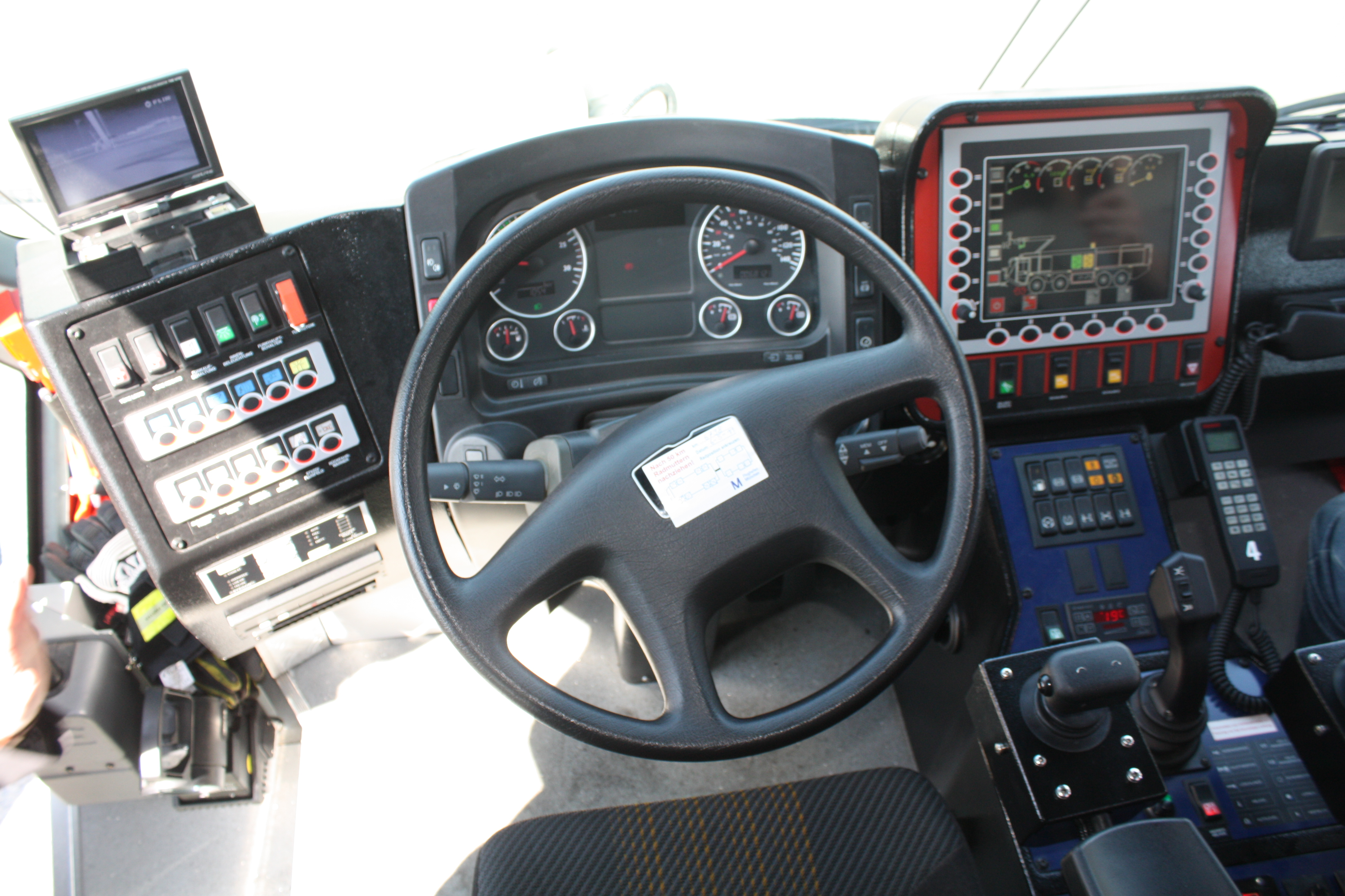 Flugfeldlöschfahrzeug Ziegler Z8, Flughafen München. Fahrerkabine.